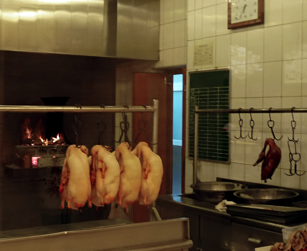 Peking duck preparating at Restaurant in Beijing